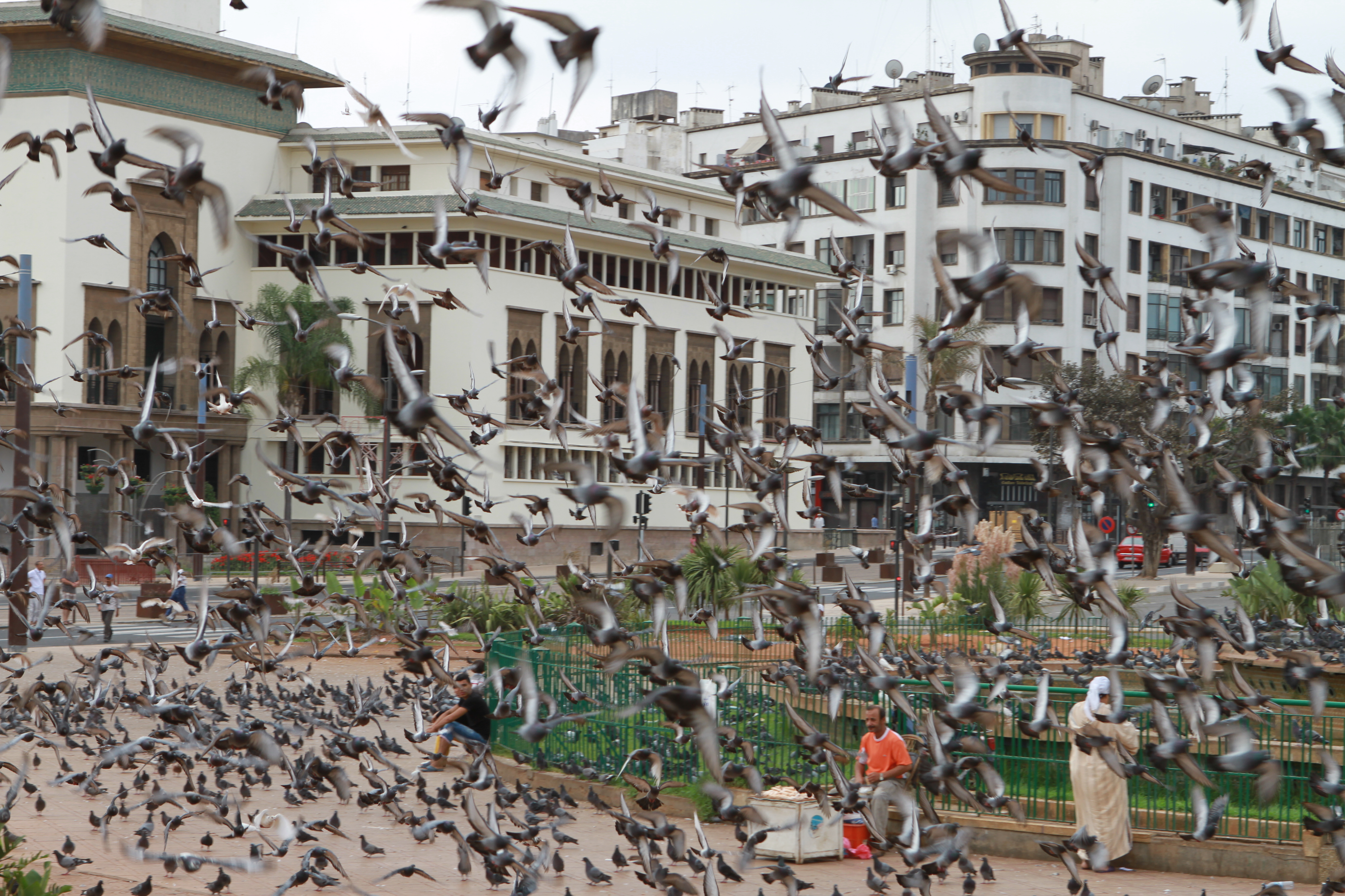 Place Mohammed V, Casablanca